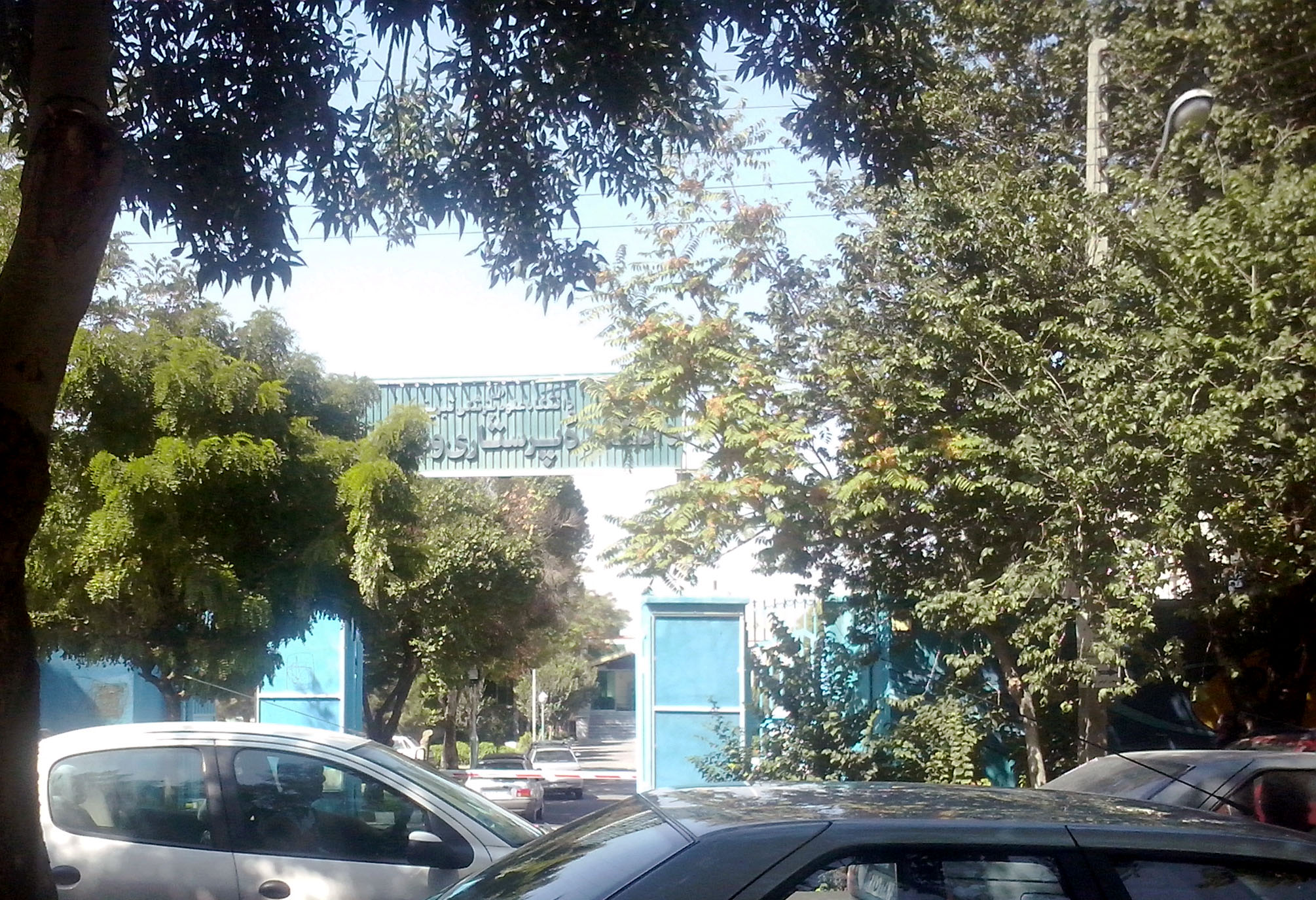 دانشکده پرستاری و مامایی تبریز بیمارستان آمریکایی سابق تبریز